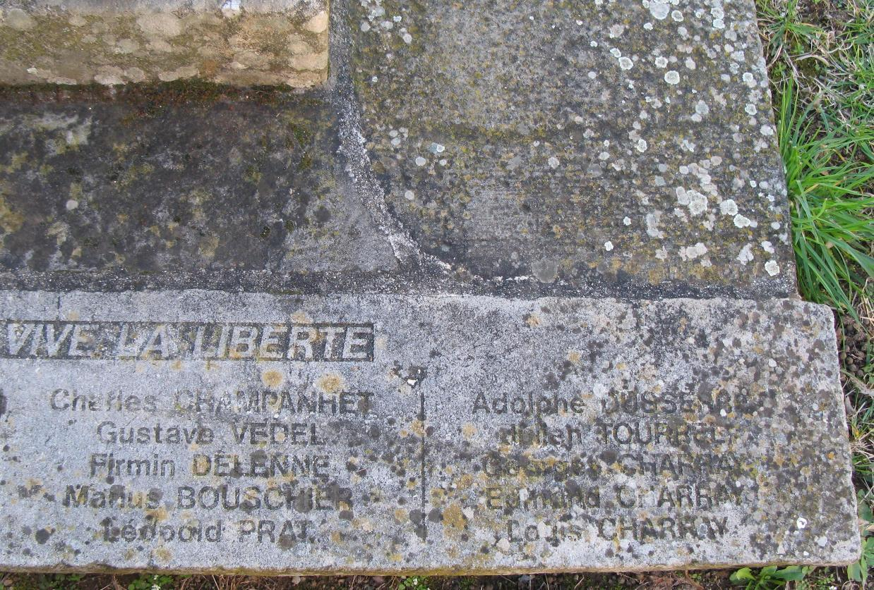 Monument aux morts de Ribes